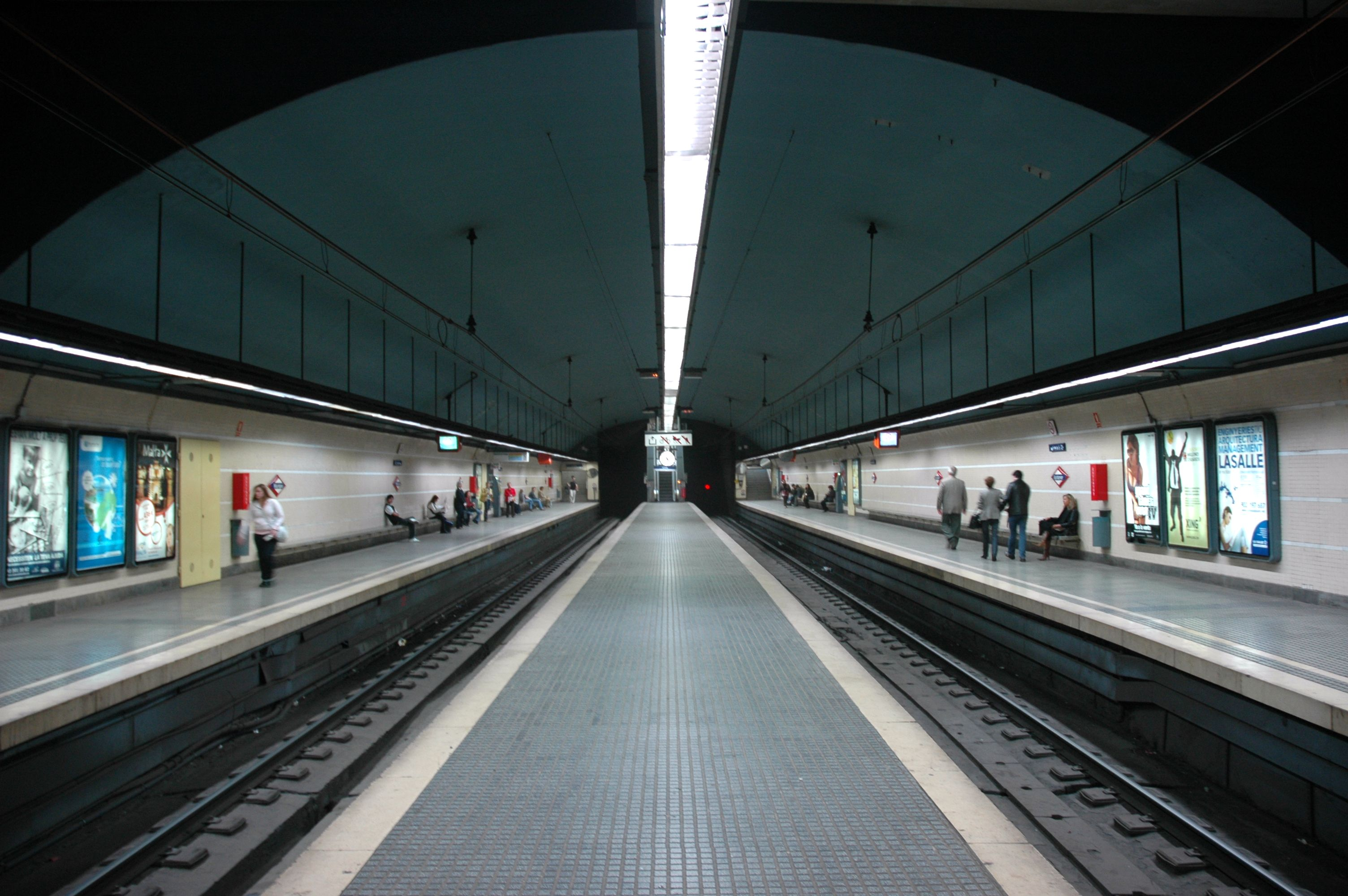 Estació de Muntaner